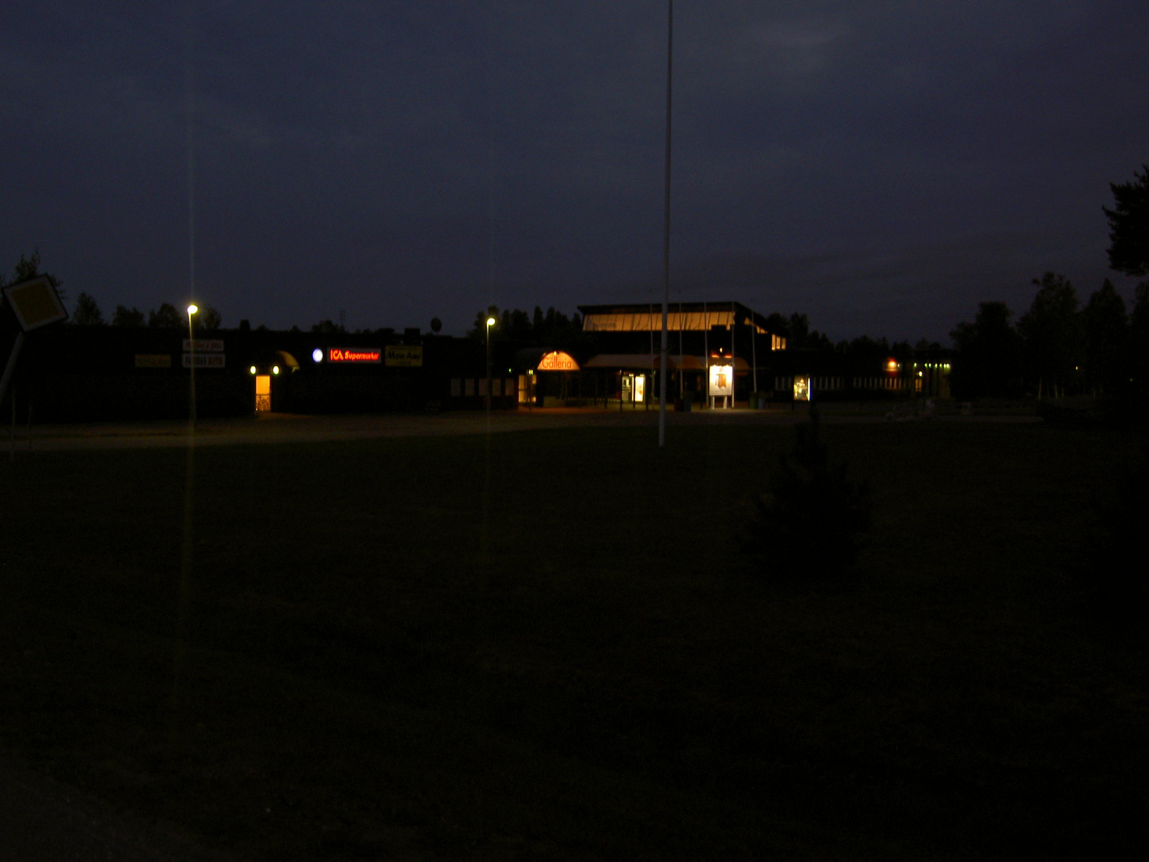 Hertsö Centrum om natten.